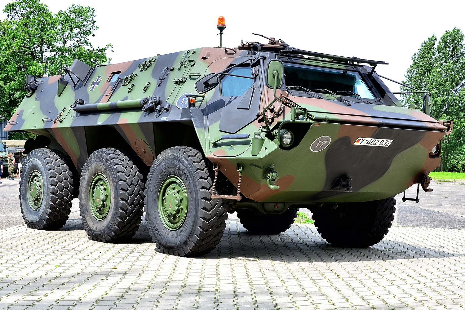 Sanitätsregiment 22, Westfalenkaserne, Ahlen, Datum/Uhrzeit: 23.06.2012 11:56:06.